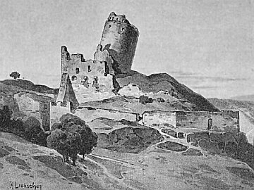 Česky: Michalovice (hrad)